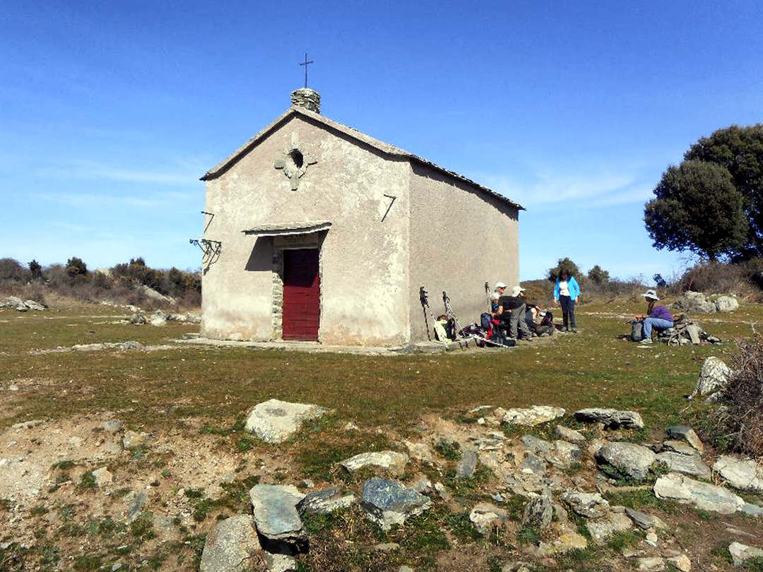 Rutali, Nebbio (Corse) - Oratoire Sainte-Claire dite Santa Chjara, chapelle rurale du XVIIe siècle, lieu de pèlerinage tous les 12 août.